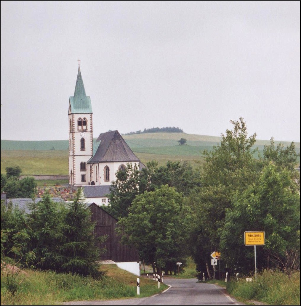 Fürstenau (Geising): Blick auf die Kirche